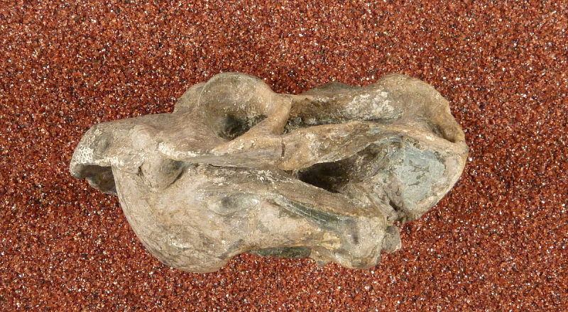 Cistecephalus microrhinus t784